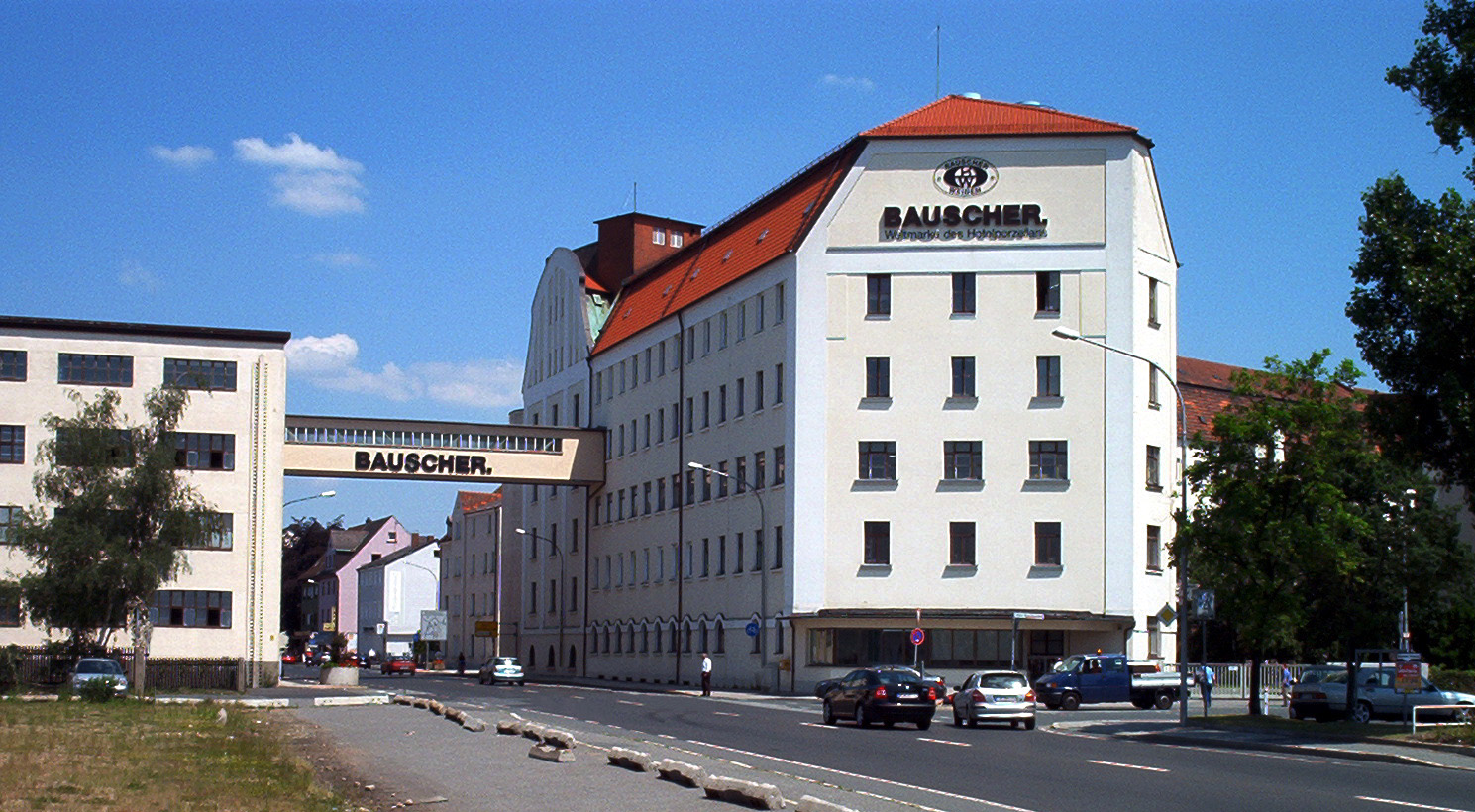 Porzellanfabrik Weiden Gebr. Bauscher (Hotelporzellan Bauscher), Obere Bauscherstraße 1 in Weiden / Oberpfalz (Ansicht von der Dr. Seeling- / Bahnhofsstraße aus)